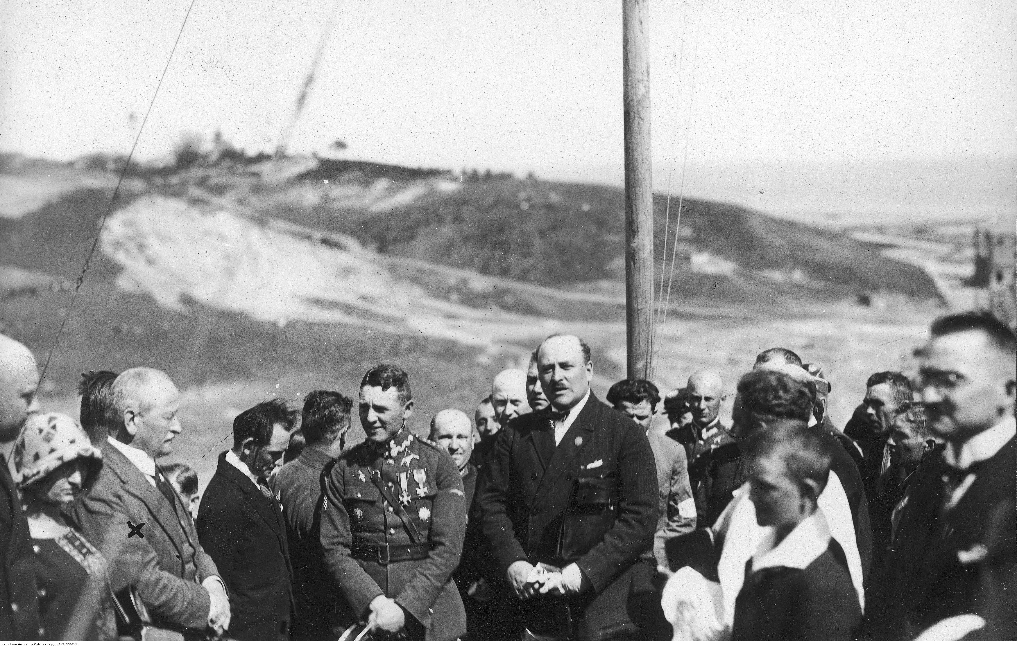 II Ogólnopolski Konkurs Szybowcowy